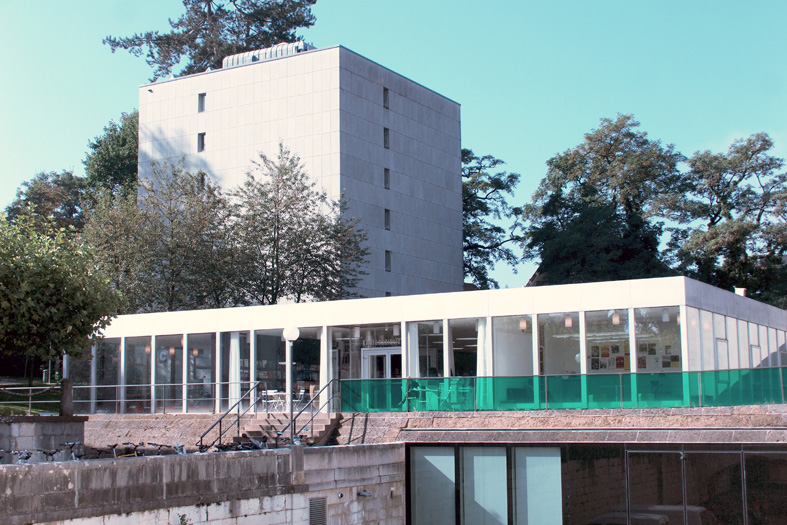 Aargauer Kantonsbibliothek